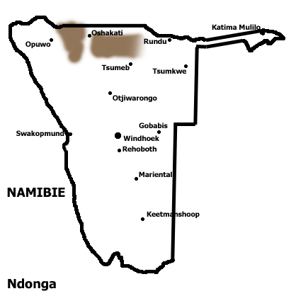 Verspreidingsgebied Ndonga in Namibie.